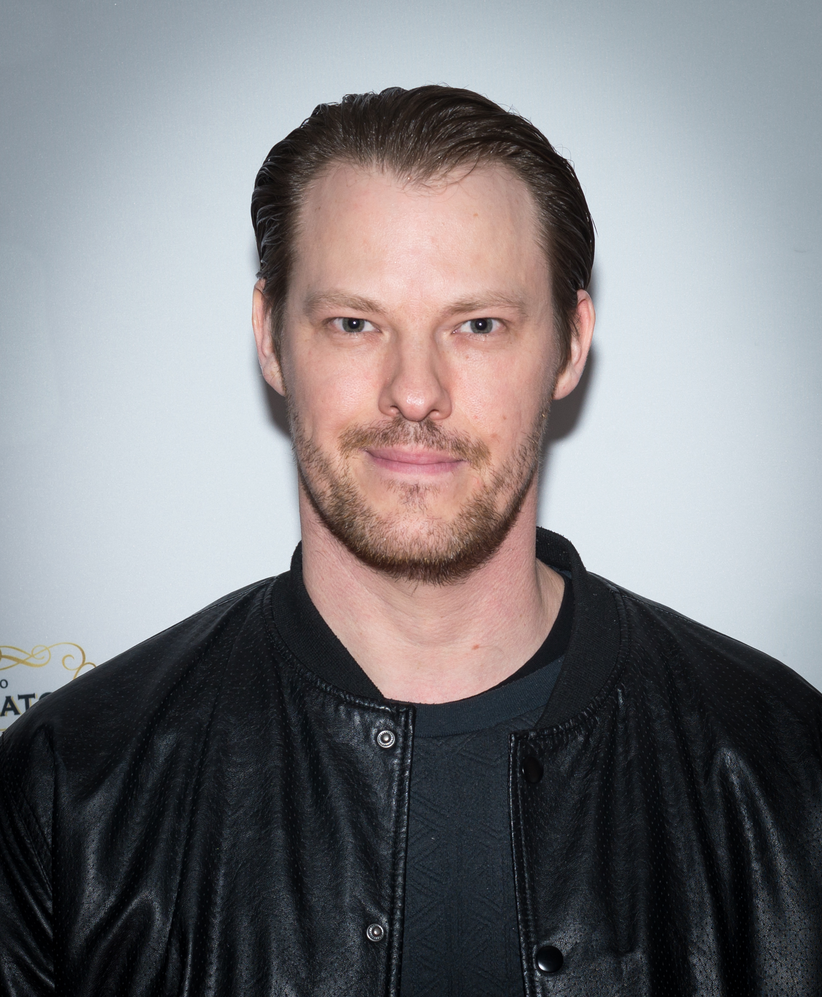 Magnus Sundberg inför prisutdelningen på Stockholms internationella filmfestival den 16 november 2018.